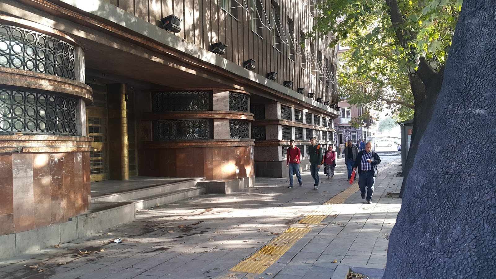 TRT FM radyo istasyonu, Ankara, 2015.